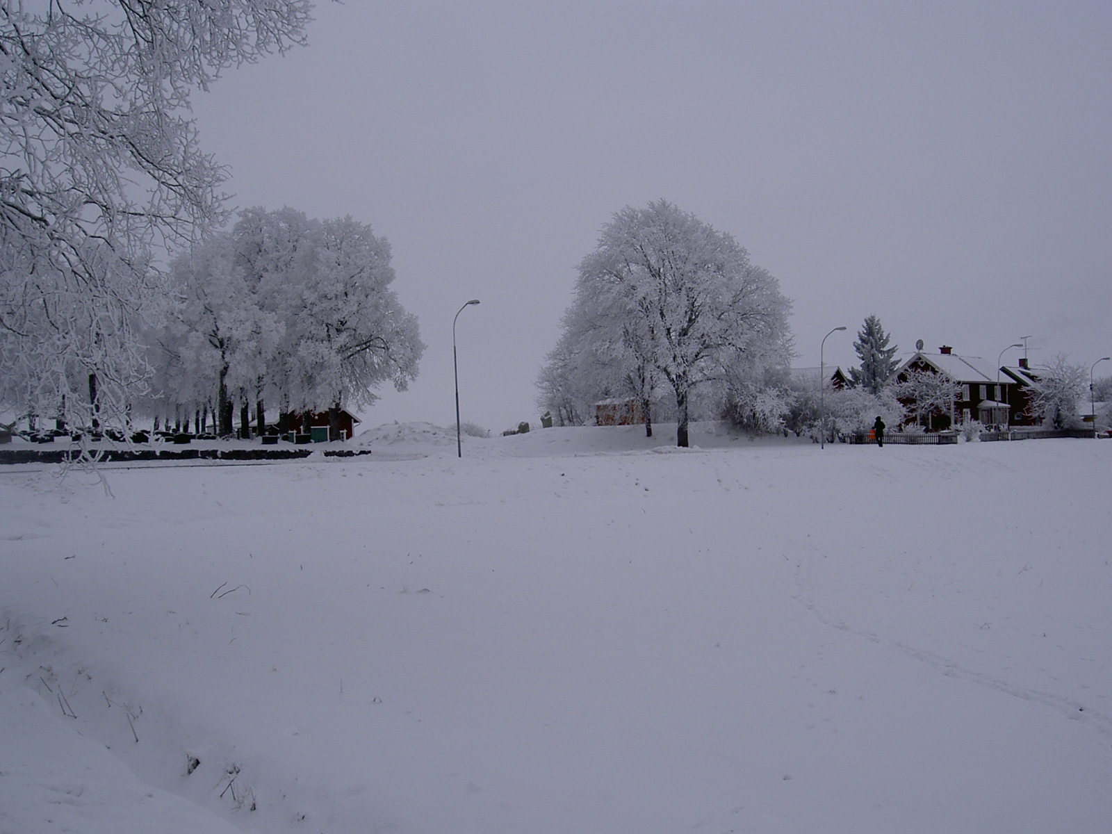 Bilden är tagen av Henrik Sultan och all användning av bilden är fri